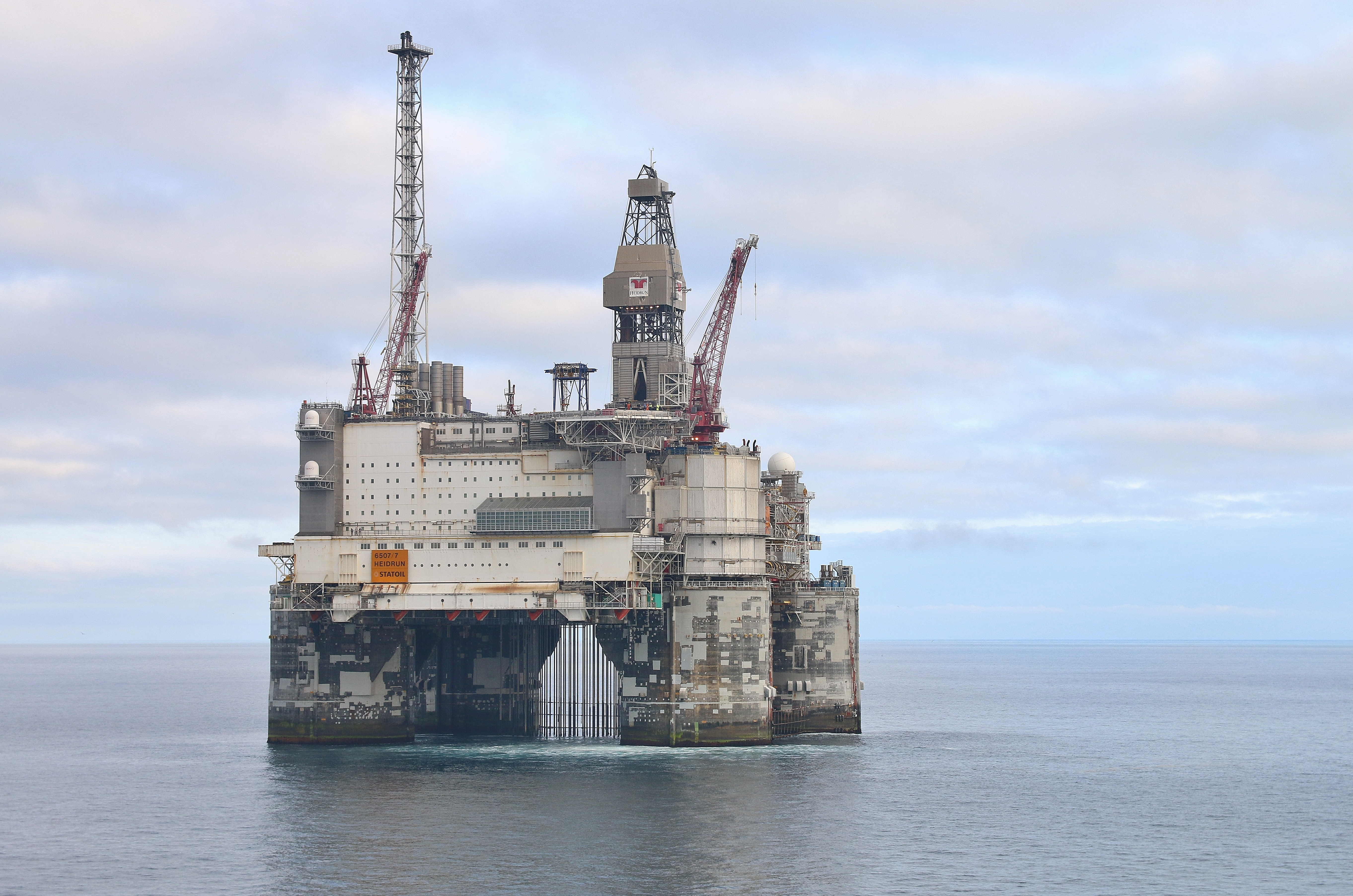 Heidrunfeltet i Norskehavet har produsert olje og gass siden oktober 1995. Feltet er utbygd med en flytende strekkstagplattform i betong. Foto: Øyvind Knoph Askeland, Norsk olje og gass